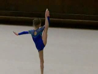 Juvanile gymnast